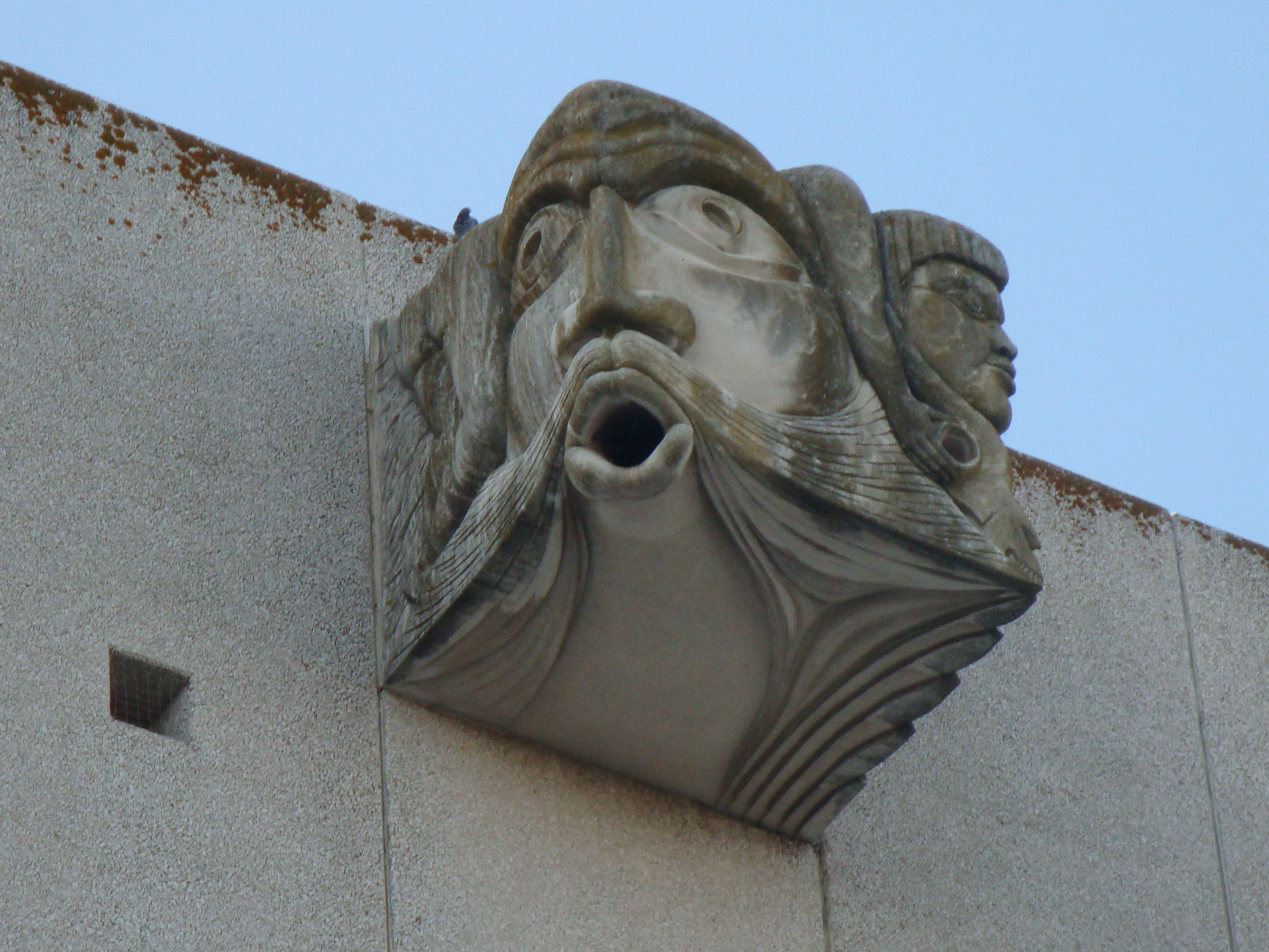 Torre do Tombo - Pormenor - Lisboa